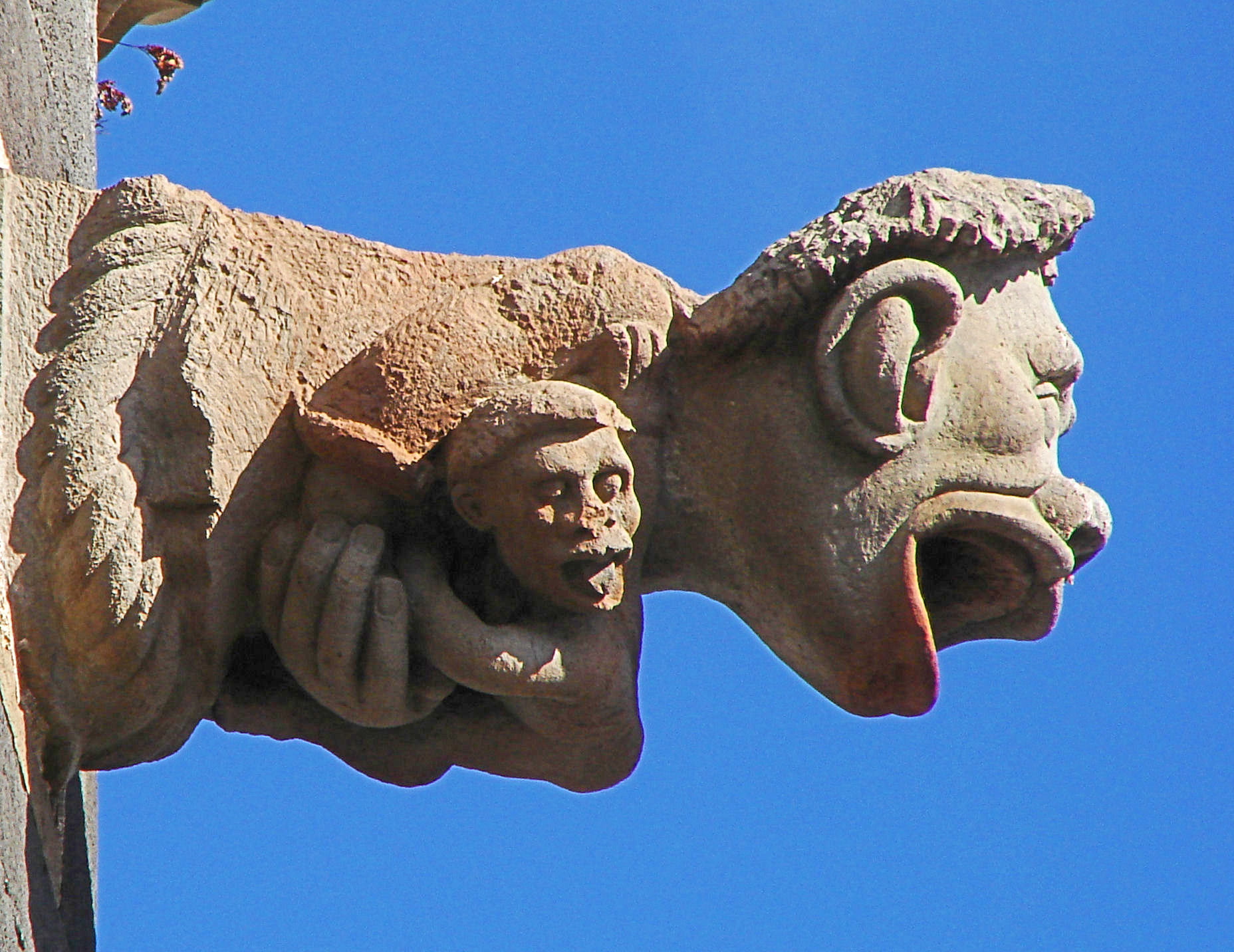 Gargola de la Iglesia Nuestra Señora de la Concepción La Orotava